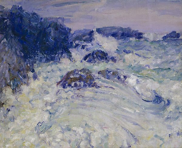 Rauhe See